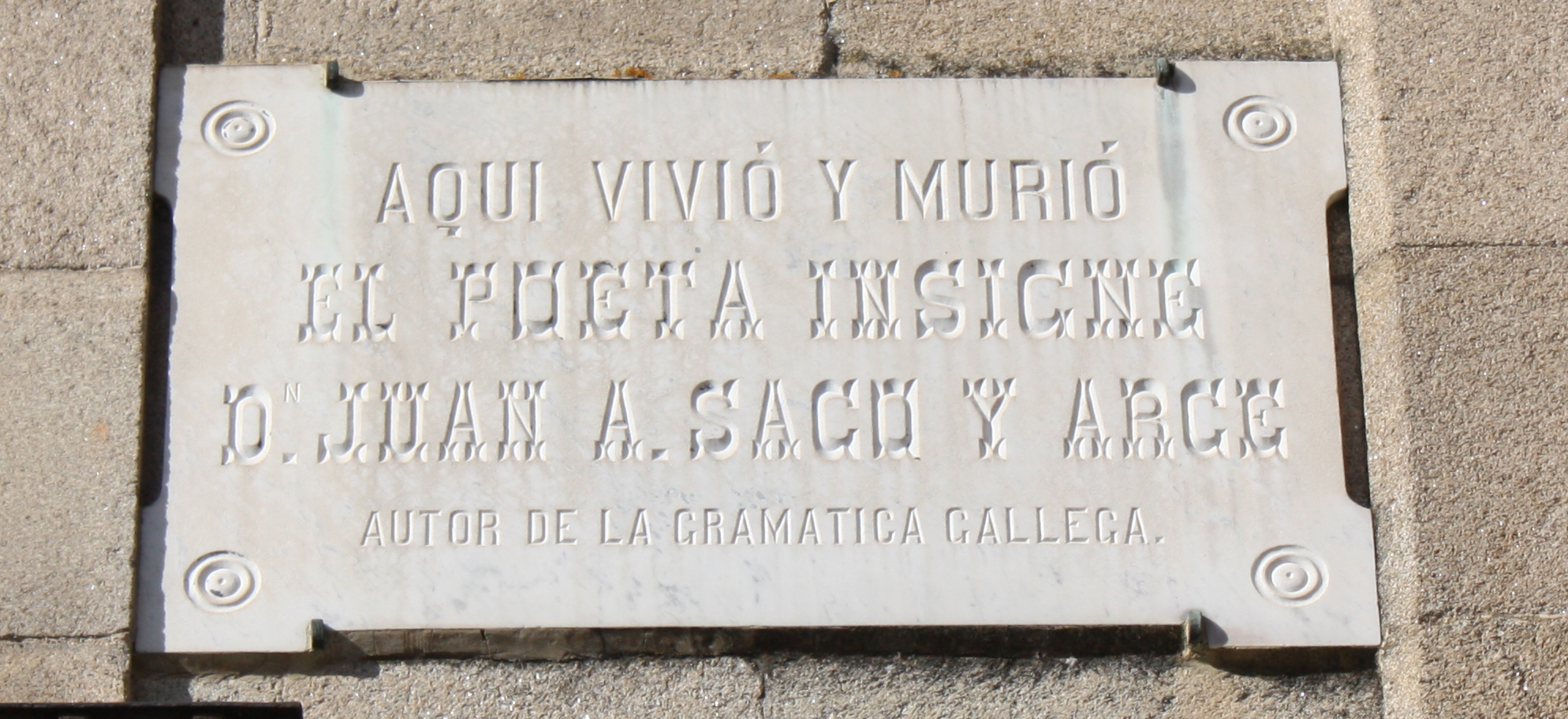 Placa na casa de Ourense onde viviu e morreu o sacerdote Juan Antonio Saco y Arce, autor da primeira Gramática da lingua galega.